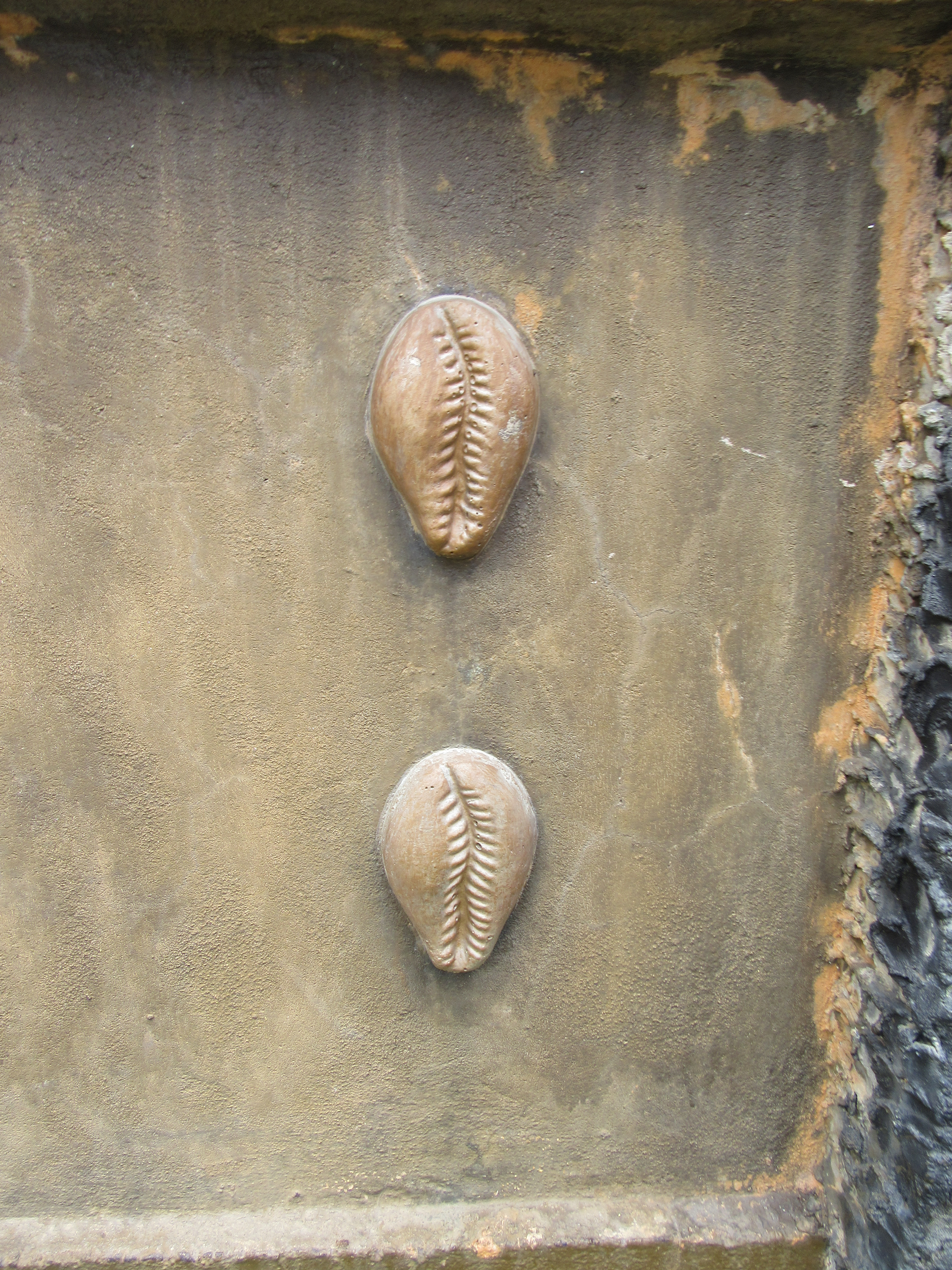 le cauris pour le fa This photo has been taken in the country: Benin